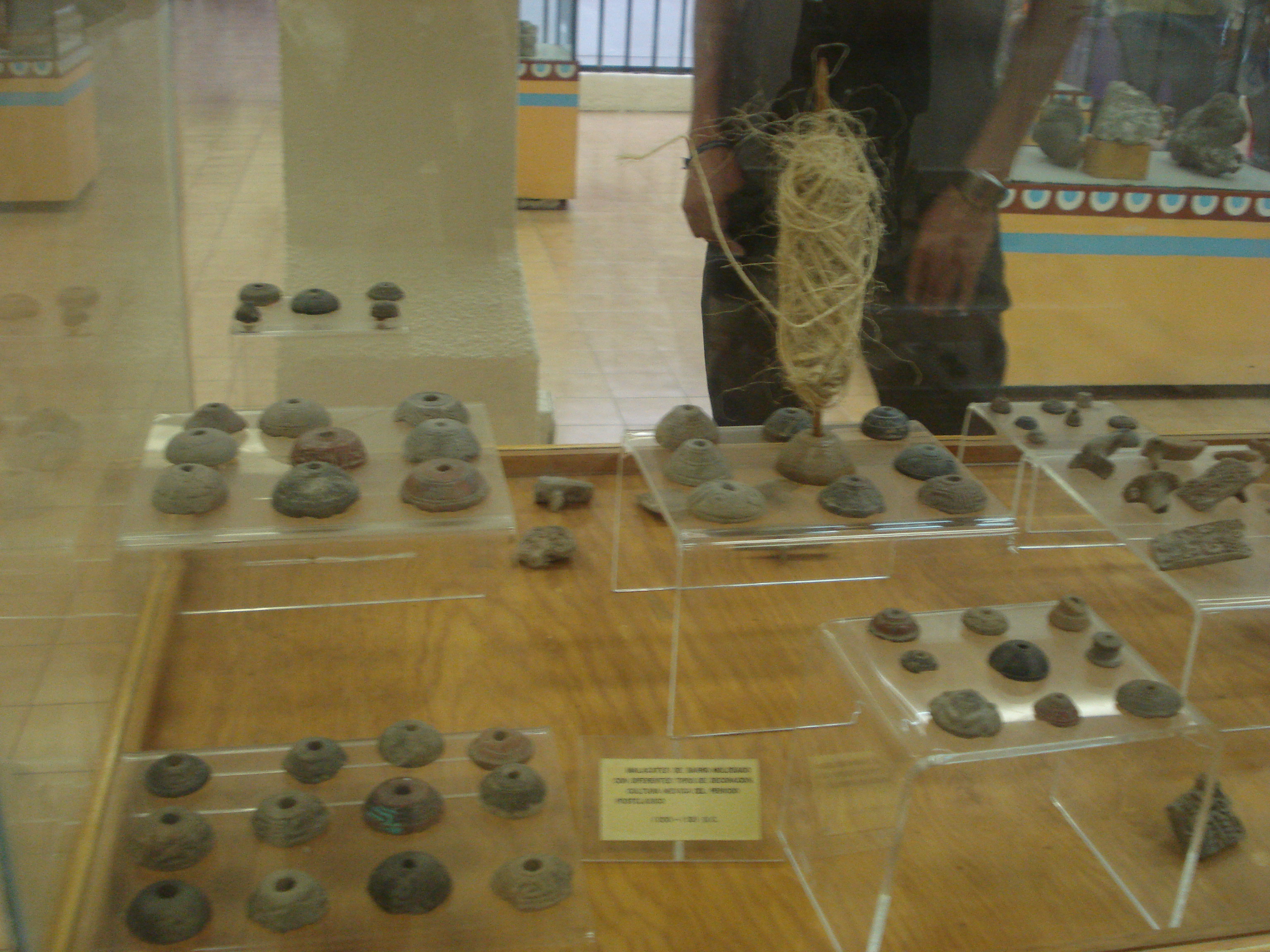 Piezas arqueologicas expuestas en el museo local del pueblo de San andres Mixquic